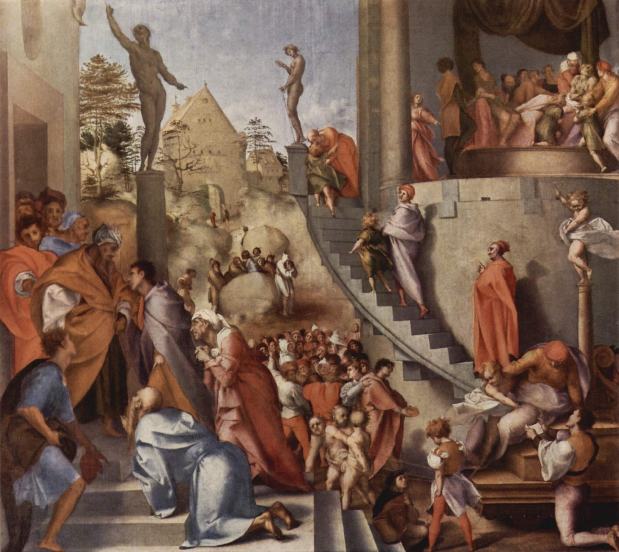 Gemälde für das Hochzeitszimmer des Pier Francesco Borgherini im Familienpalast in Florenz, Szene: Joseph in Ägypten